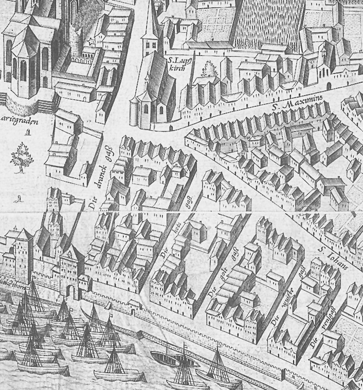 Ausschnitt des Mercator - Stadtplanes, Bereich Köln, Vorstadt Niederich, Trank- Kotz- Goldgasse und Rheinufer